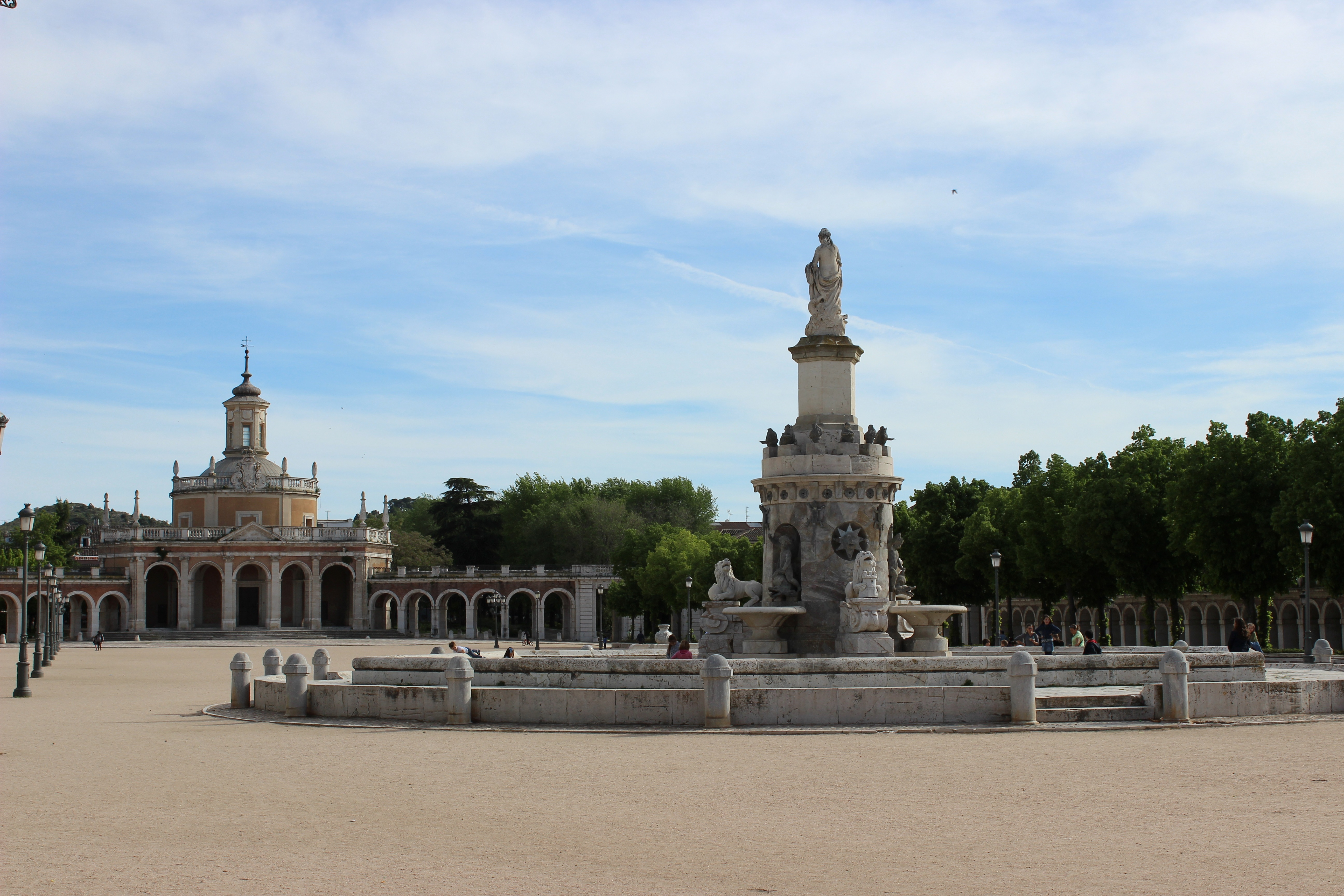 Aranjuez. Plaza de San Antonio.